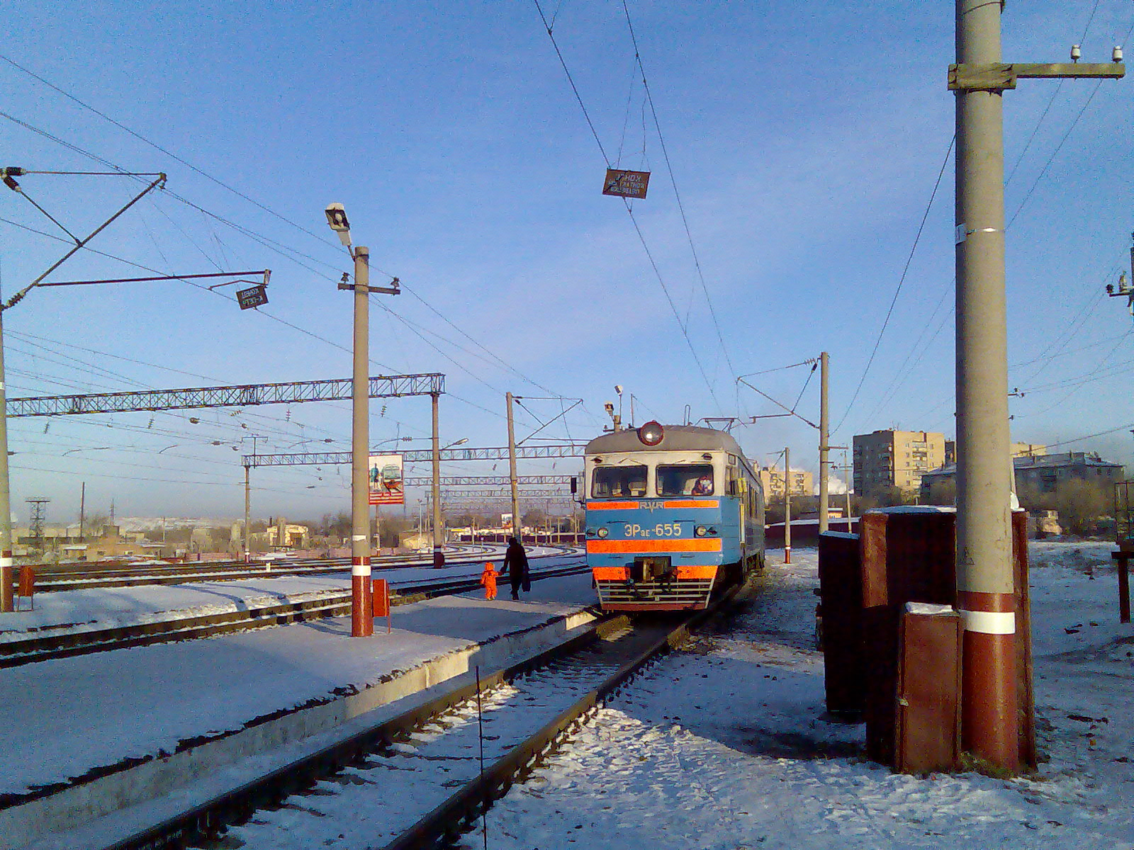 Электричка в Карталы